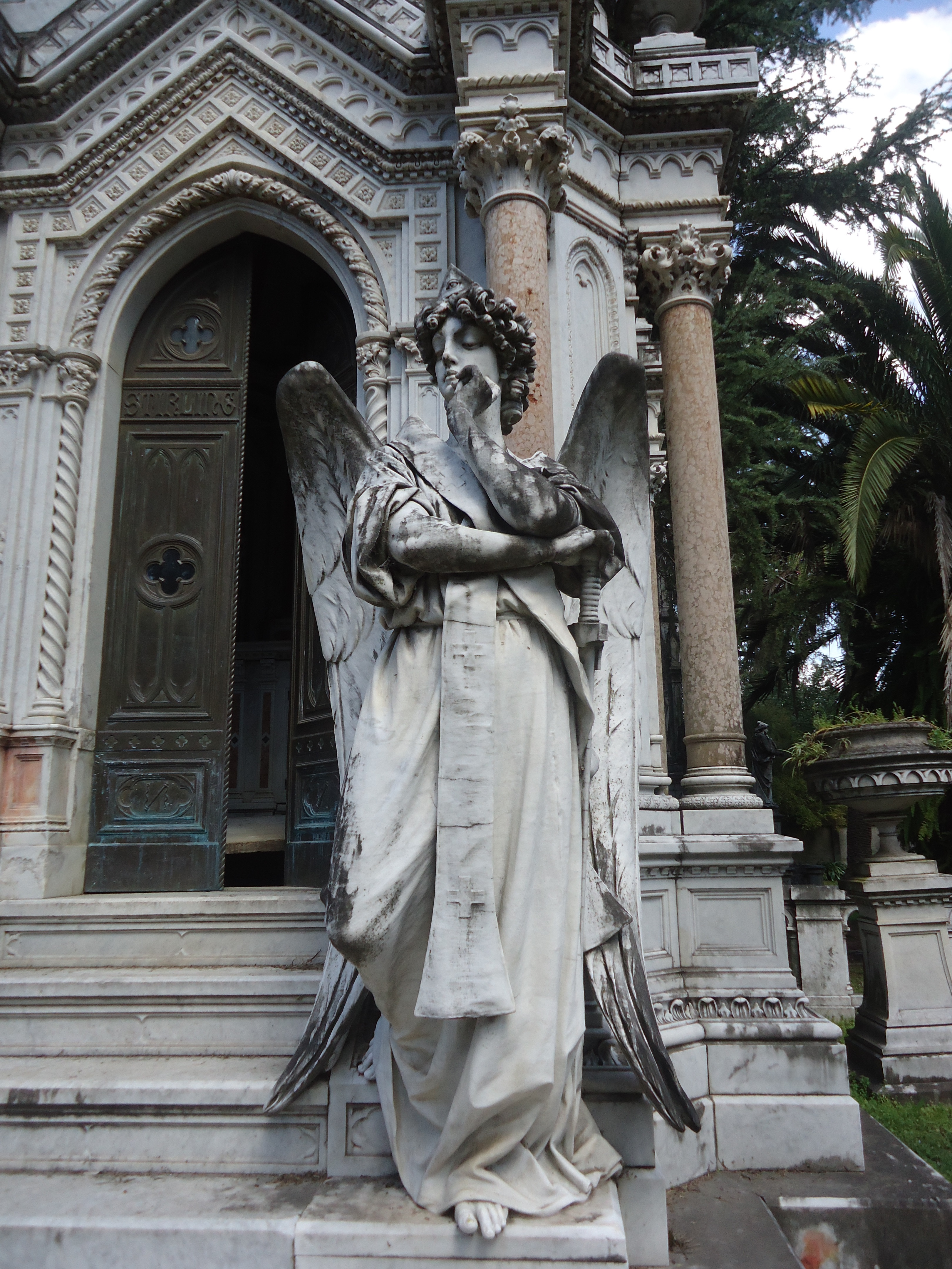 Estatua del arcángel Uriel, la representación del ojo de Dios es visible en la corona. Monumento a Perpetuidad o Cementerio Viejo. Ubicada en el departamento de Paysandú.